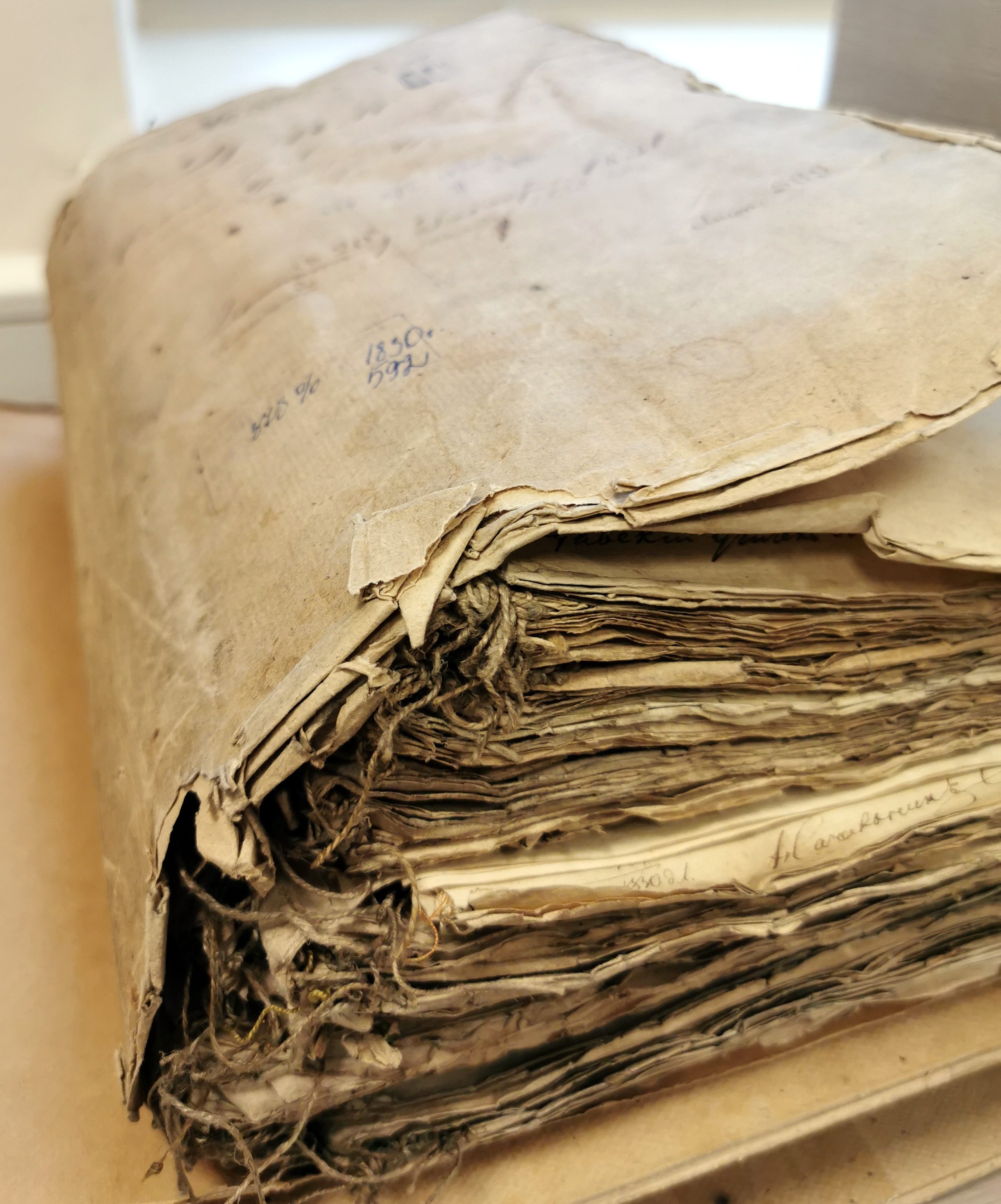 VU studentų byla Nr. 592 Lietuvos valstybės Istorijos archyve